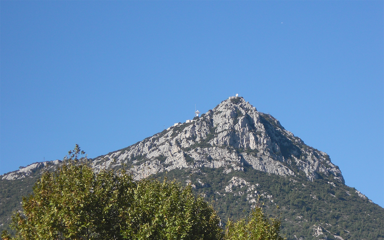 Le Coudon vu de l'Université de la Garde.